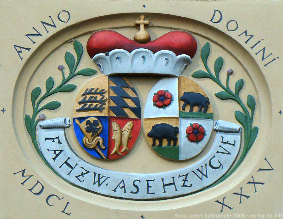 Württemberg-Ebersteinsches Allianzwappen am Graf-Eberstein-Schloss in Kraichtal-Gochsheim